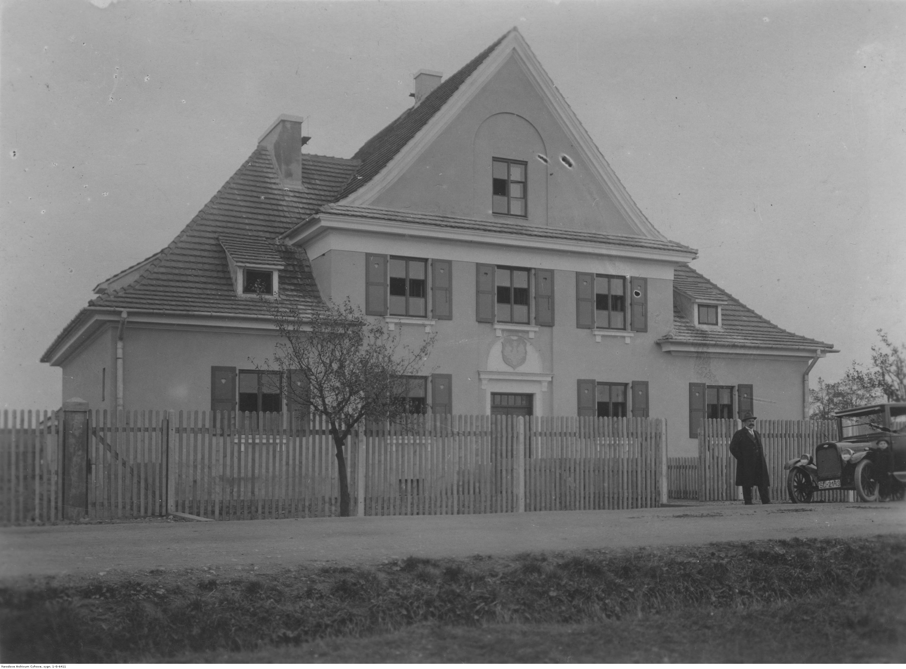 Budynek Straży Granicznej w Pogwizdowie. Koncern Ilustrowany Kurier Codzienny - Archiwum Ilustracji. Sygnatura: 1-G-6411